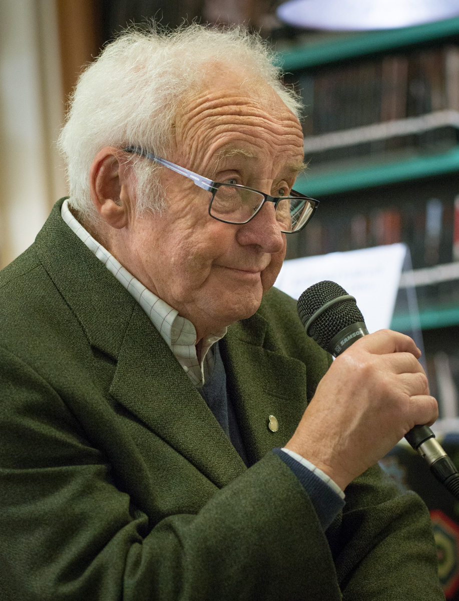 Kjell-Olof Feldt presenterar sin och makan Birgitta von Otters bok "Vägen ut. En loggbok om alkoholism och medberoende" på Hedengrens i Stockholm den 18 oktober 2016.